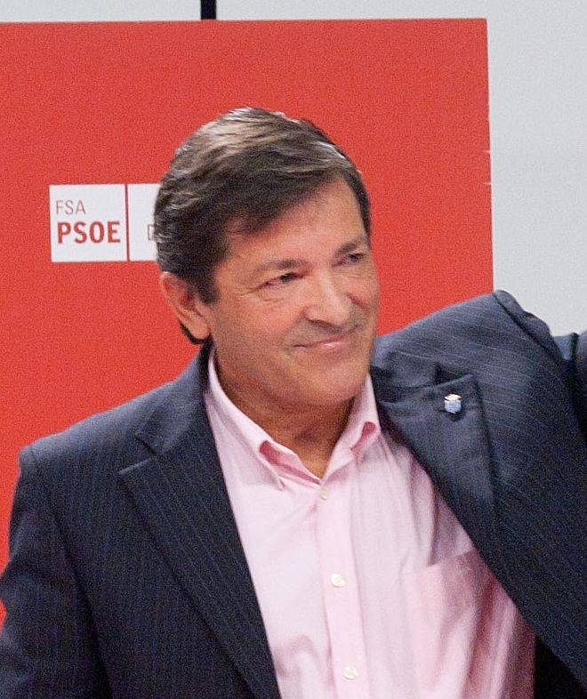 Javier Fernandez Fernandez (crop)